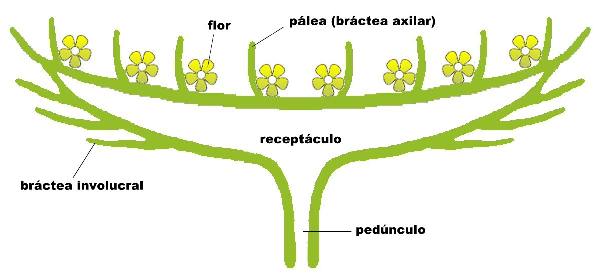 Capítulo de Asteraceae: esquema con sus elementos constitutivos.